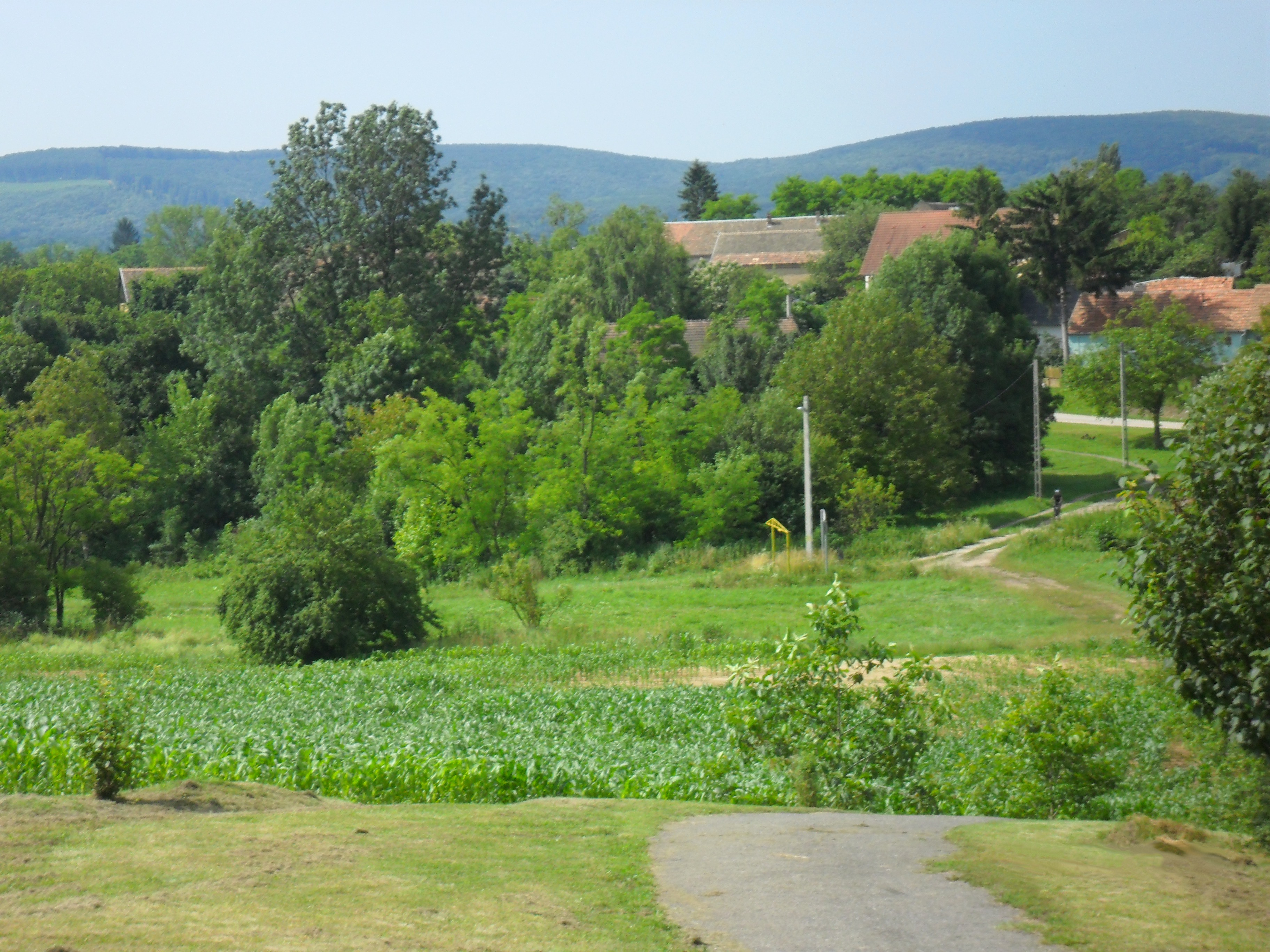 Áta a temetőből nézve